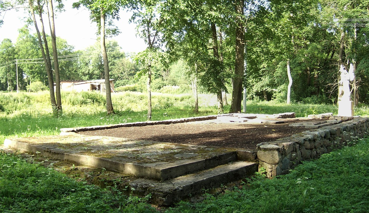 Liubavo dvaro koplyčios pamatai